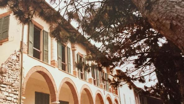 Una foto dell'attuale cascina ed ex convento quattrocentesco